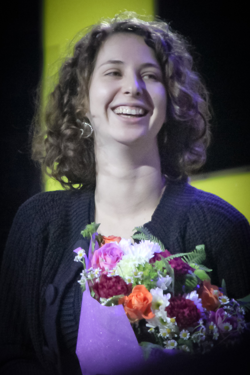 Премия Рунета-2011. Юлия Эйдель - главный редактор "Частного корреспондента"